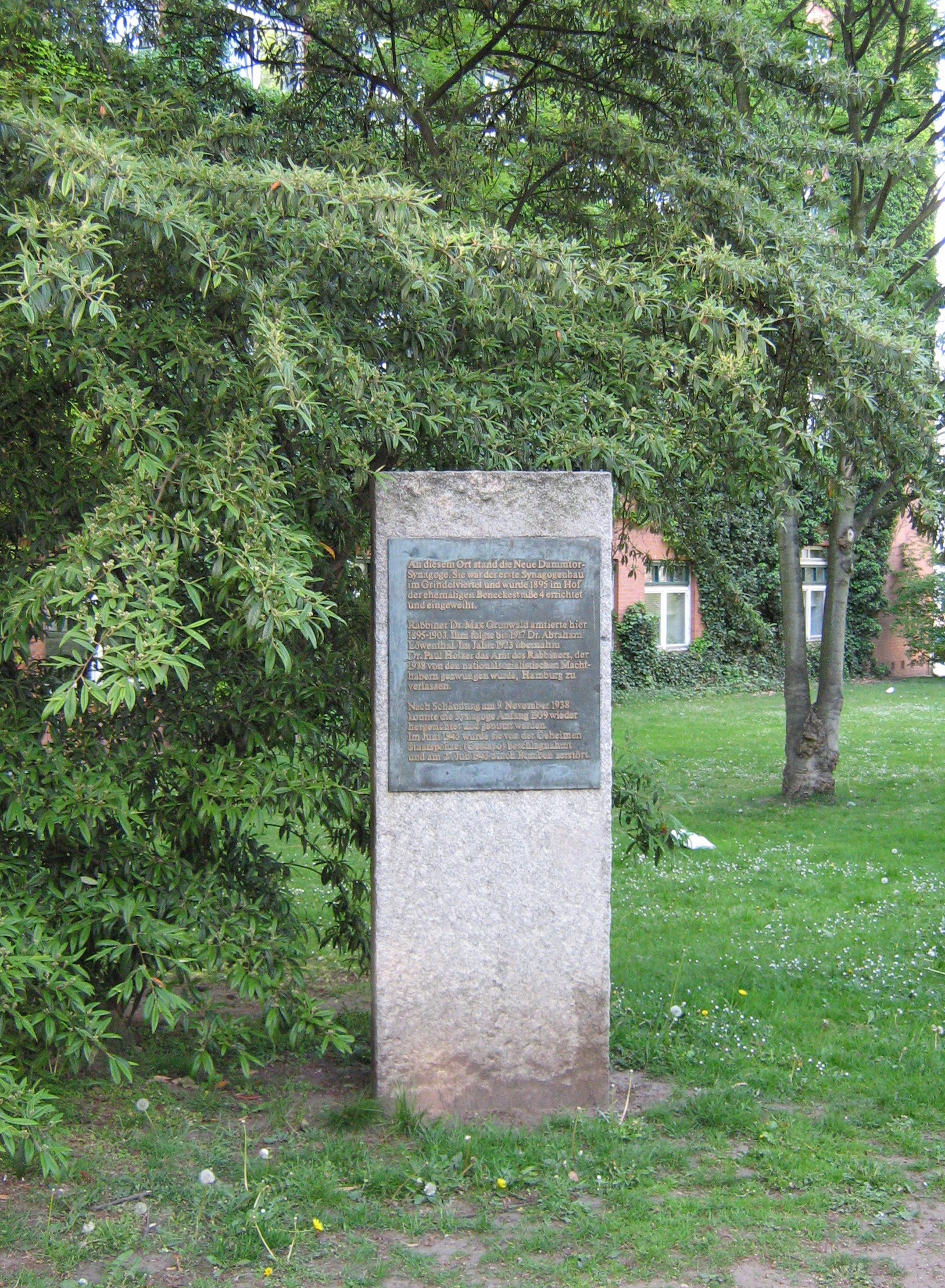 Gedenkstein für den ehemaligen Neue Dammtor-Synagoge, Hamburg Grindel / plaque for the former neue Dammtor-Synagoge, Hamburg-Grindel